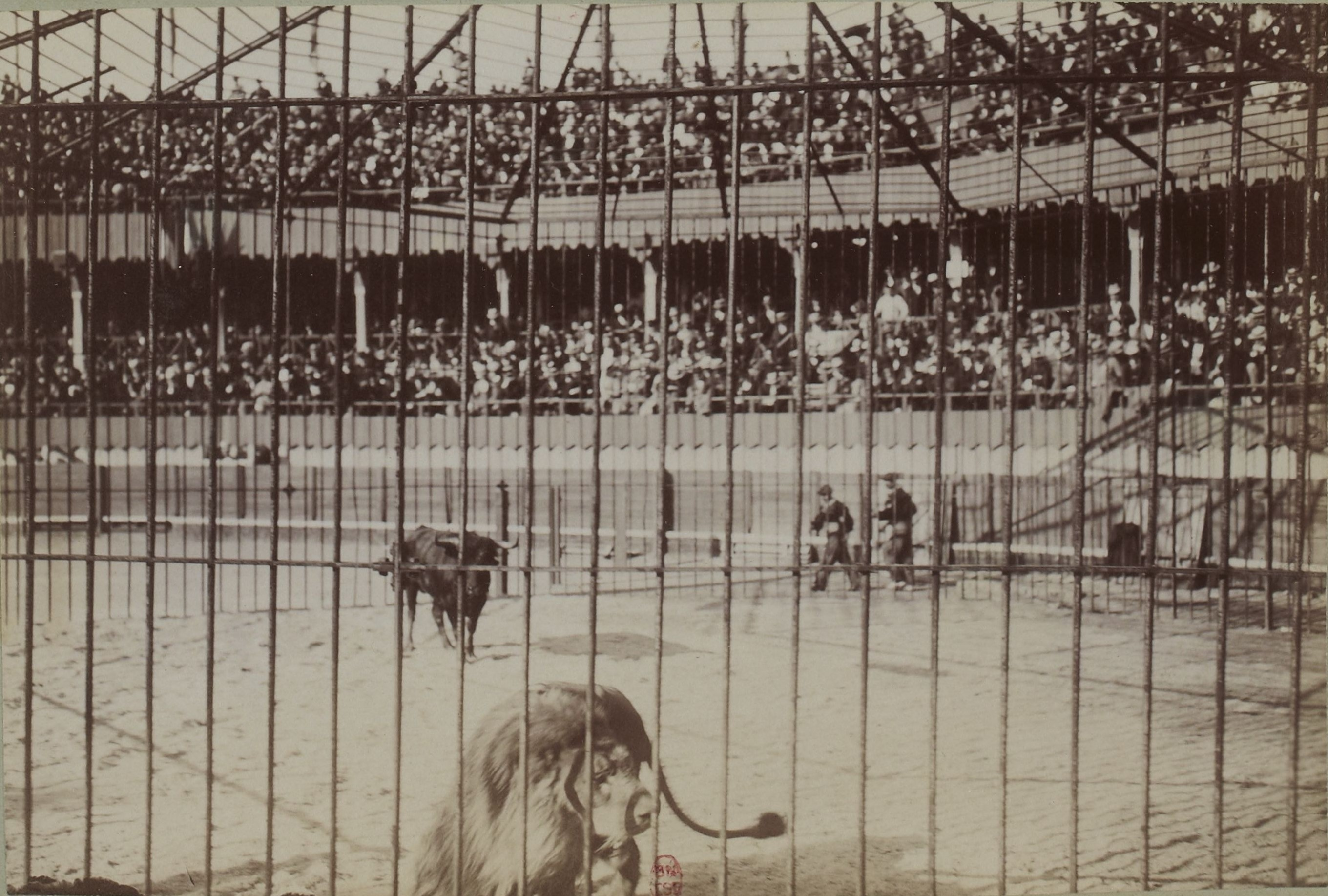 [Collection Jules Beau. Photographie sportive] : T. 9. AnnÃ©e 1899 / Jules Beau : F. 50. Lion et Toreau, Roubaix